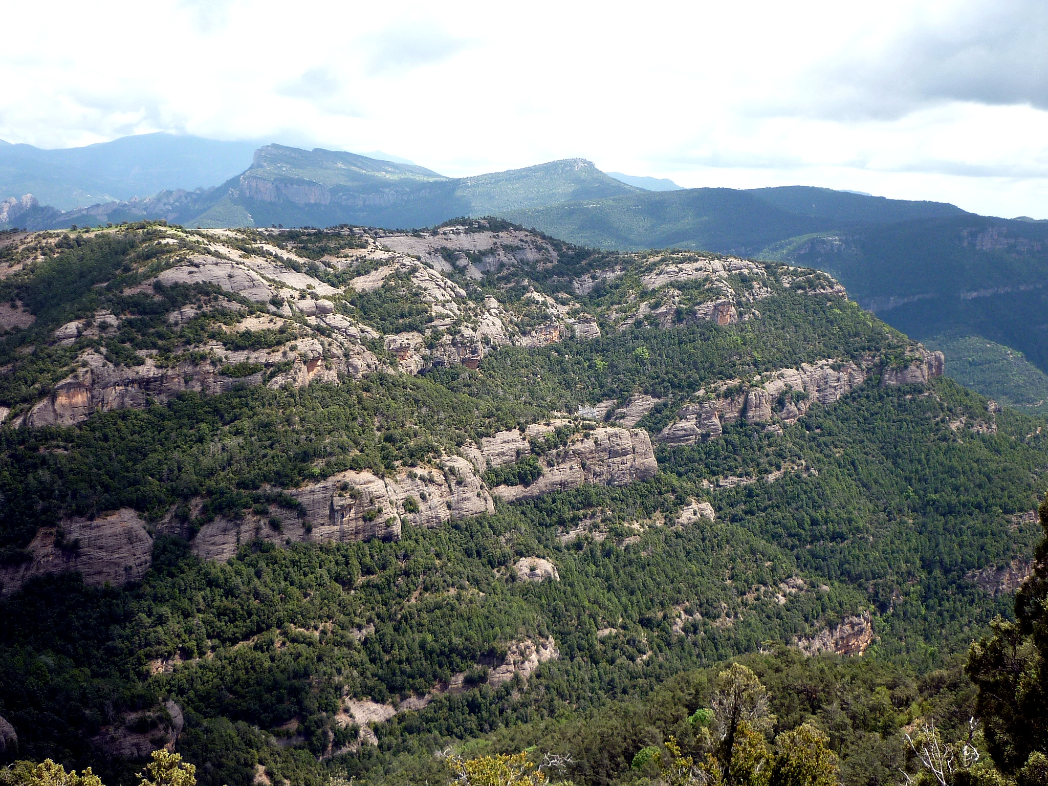 El Serrat de Capdevila a la solana de la Rasa de Torrenteller, des de la Serra Alta